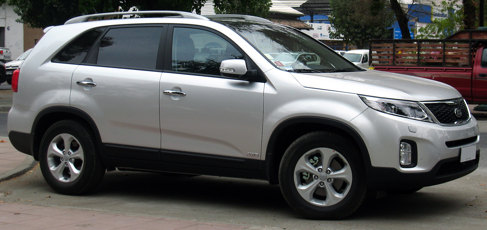 Kia Sorento EX 2.2 CRDi AWD 2013